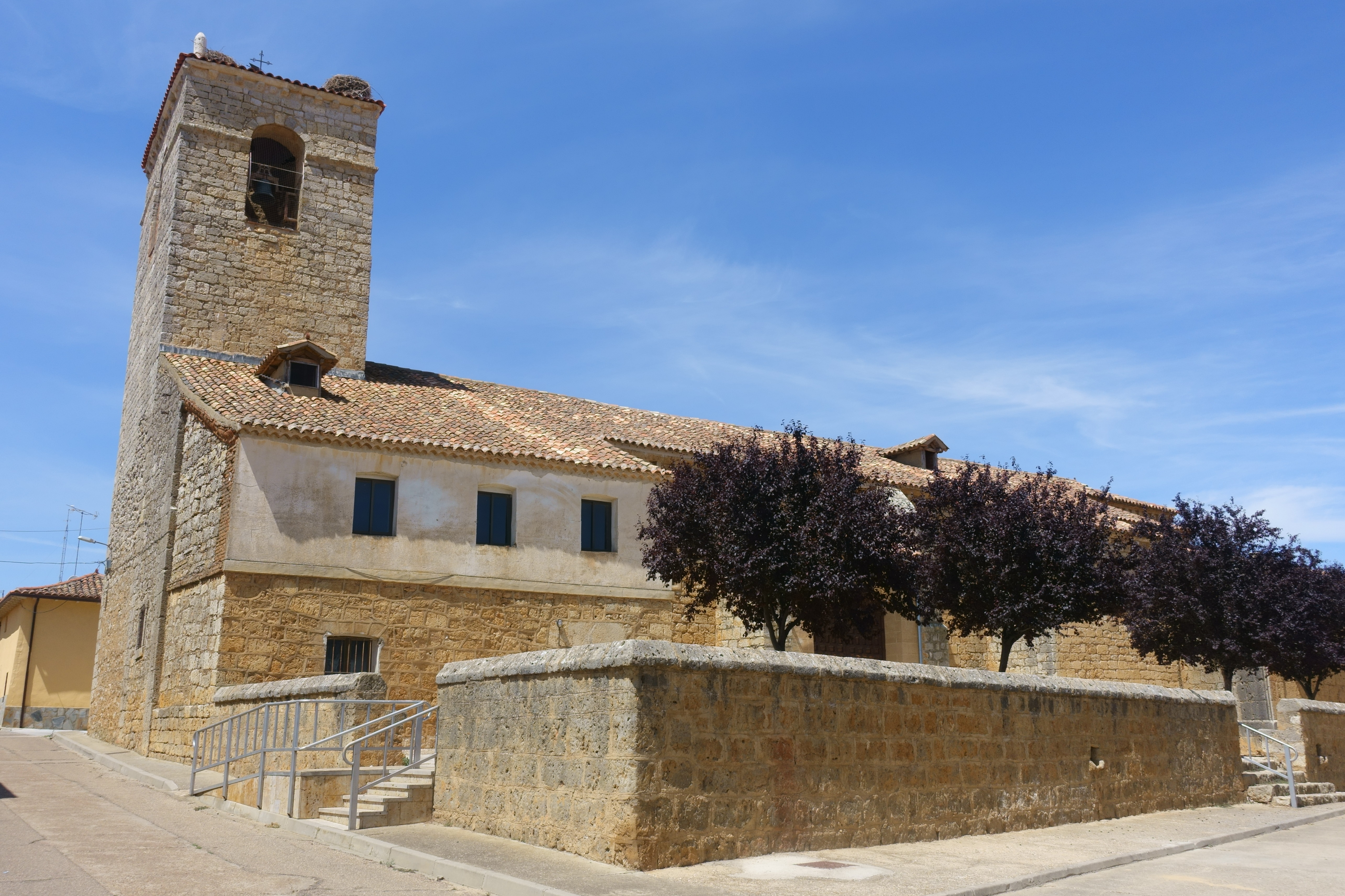 Iglesia de Santa María la Sagrada, Tordehumos (Valladolid, España).